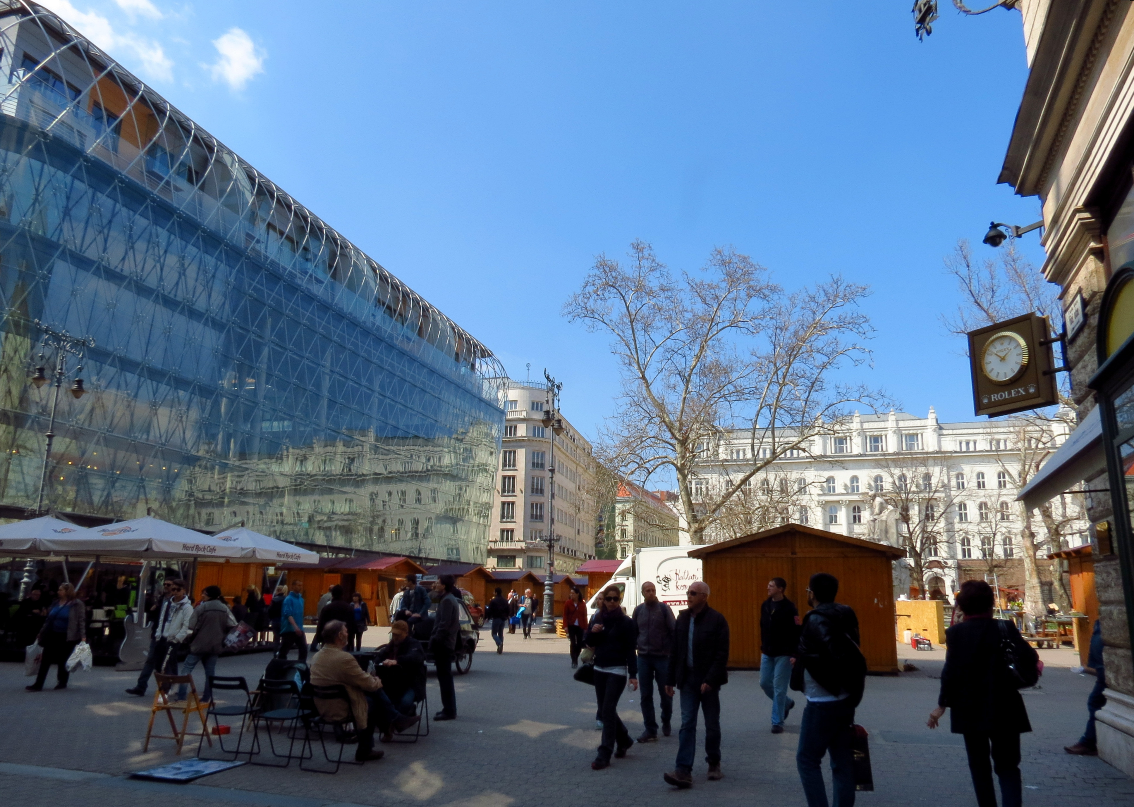 Vue de Budapest.